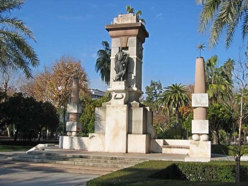 Monumento a Julio Romero de Torres en los Jardines de la Agricultura, en Córdoba (España).